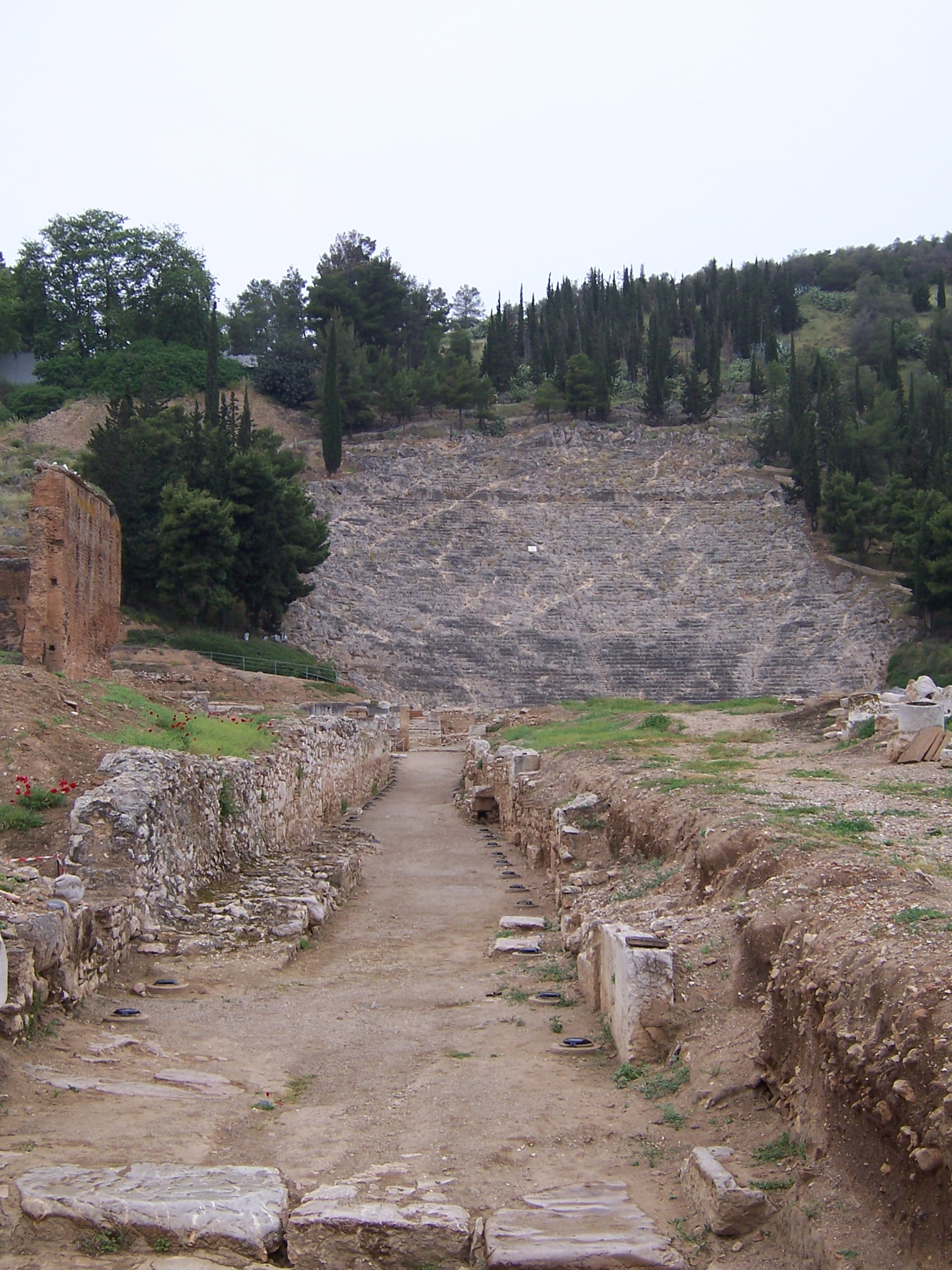 Theatre antique d'Argos, vu depuis l'entrée du site. 37°37′54″N 22°43′10″E / 37.63167°N 22.71944°E